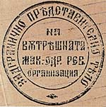 Печат на Задграничното представителство на ВМОРО.